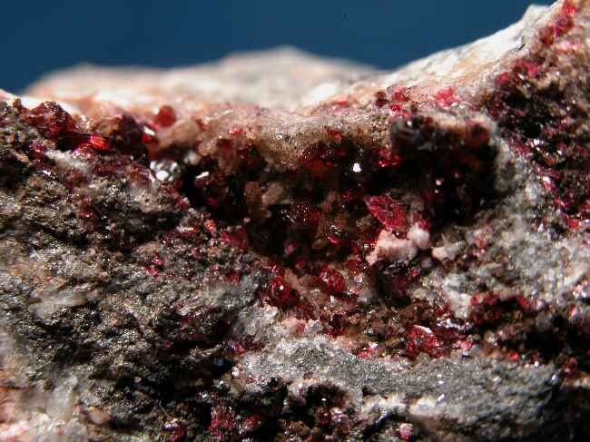 rozenit, pochodzenie Maroko, autor zdjęcia Piotr Menducki